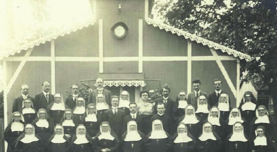 Zuster en onderwijzers van de School van de koningin te Wulveringem. In het midden mevrouw Destrée, de administratieve organisatorische directrice